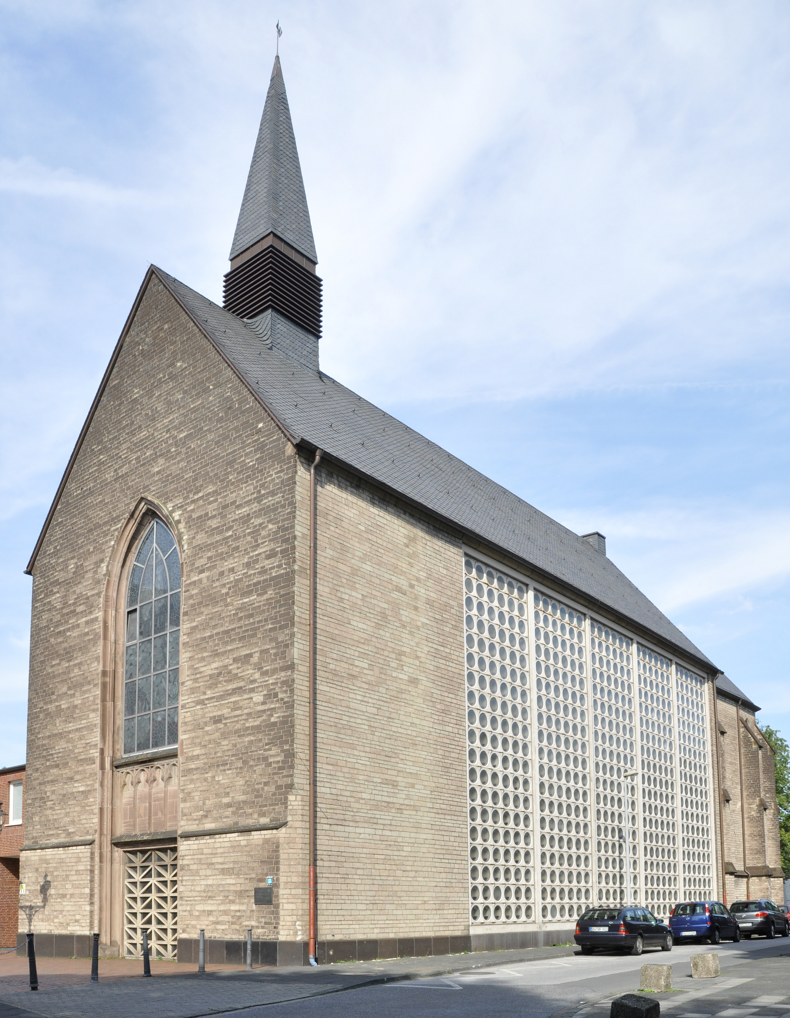 Ansicht der Karmelkirche von SüdwestenThis is a photograph of an architectural monument., no. 338